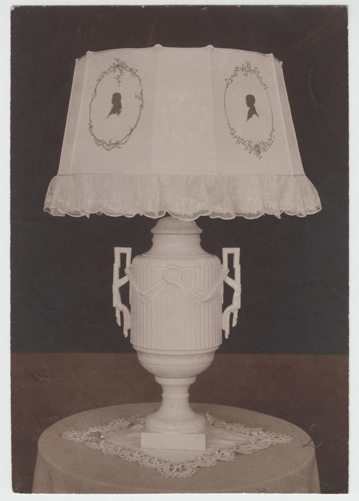 Eveline Maydelli käärilõigetega lambisirm / A lamp decorated with Eveline Maydells silhouettes